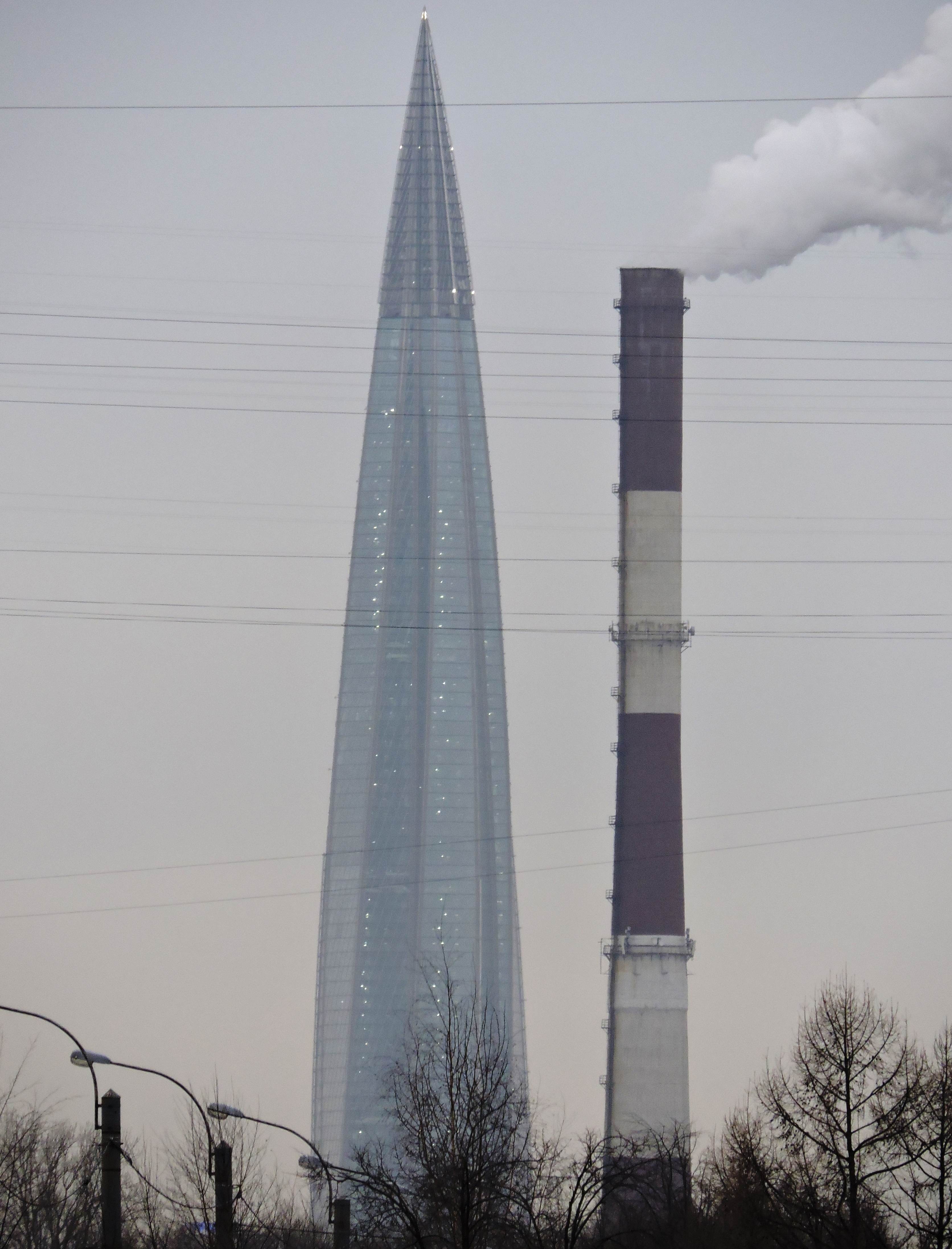 Своеобразное соревнование: здание vs сооружение. Лахта-центр и дымовая труба Приморской котельной. Расстояние между объектами по прямой составляет 3,6 км. Высота трубы равна 180 метрам